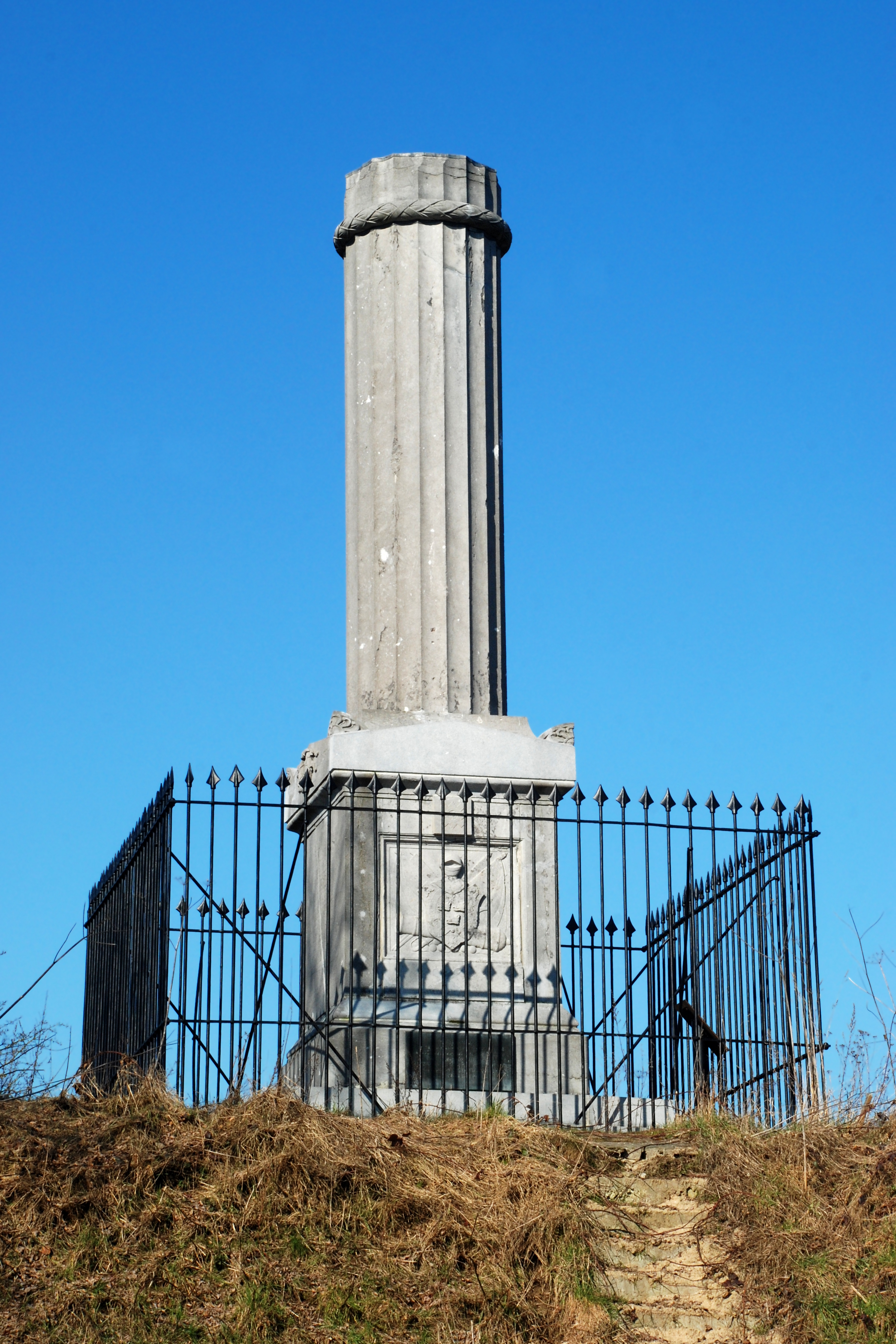 Belgique - Brabant wallon - Bataille de Waterloo - Monument Gordon